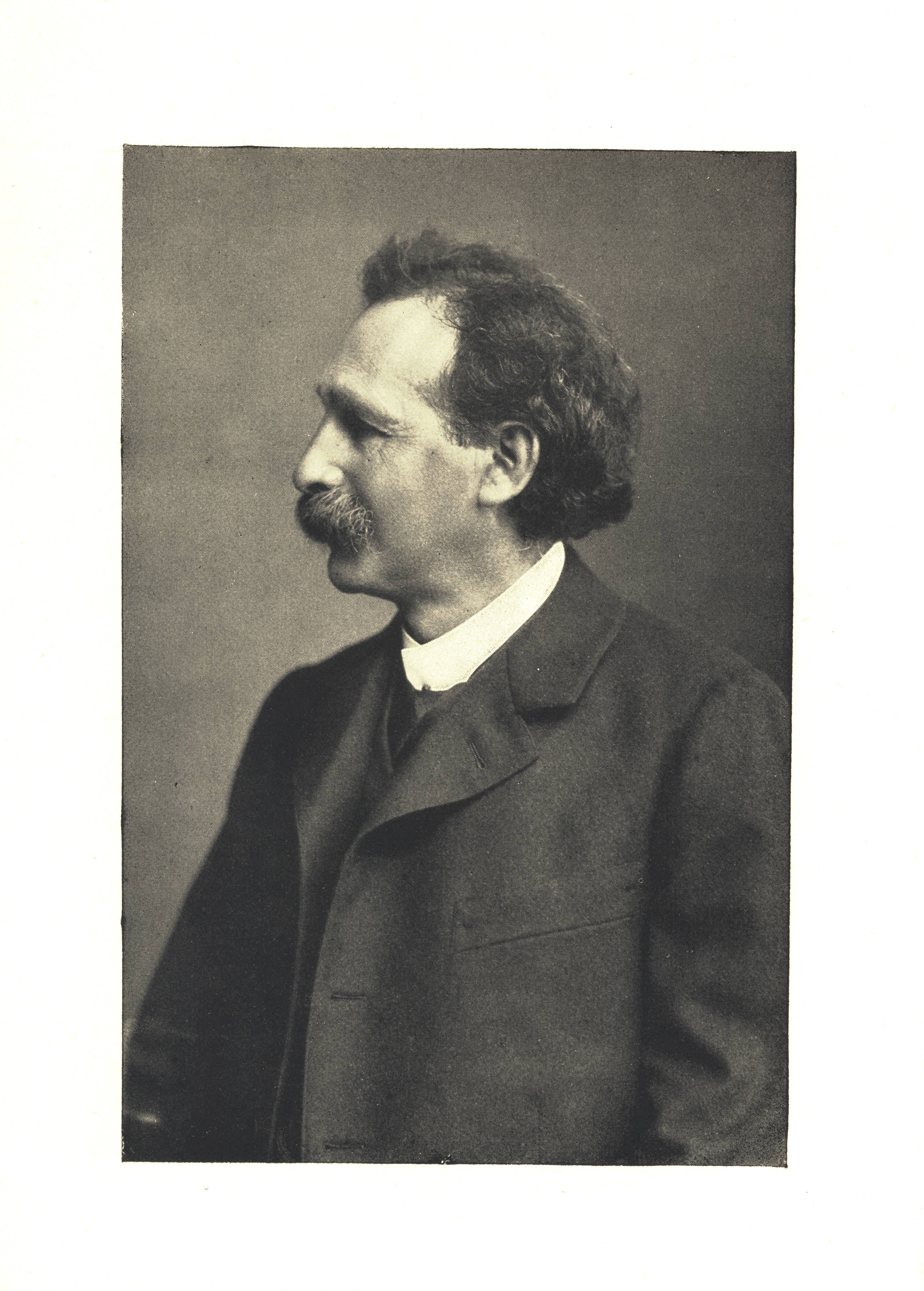 Porträt von Gustav Jacobsthal aus der Sammlung Frankfurt